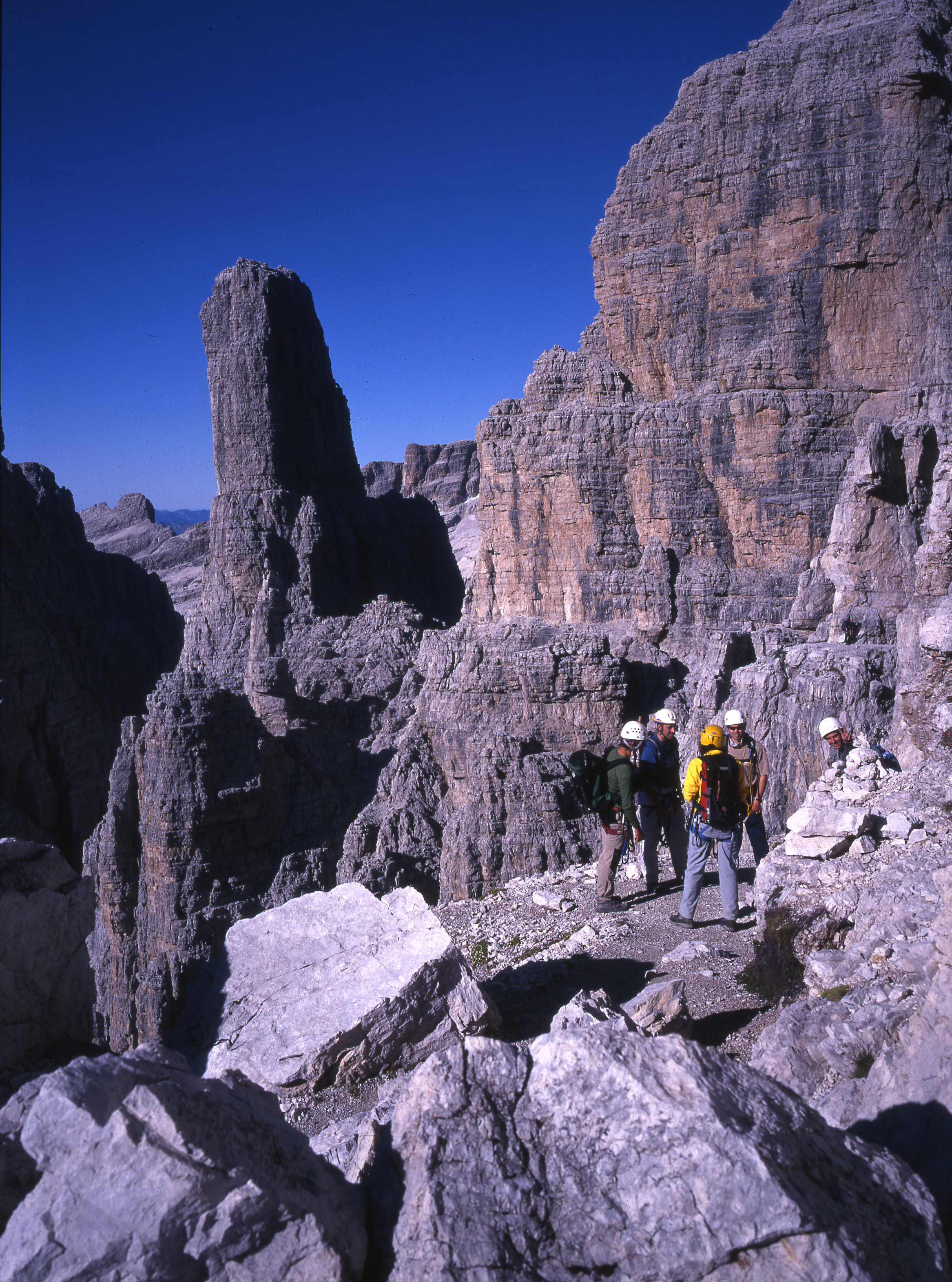 Bildgegenstand: Italien, Brenta, Gruppe auf dem Sentiero delle Bocchette Centrale, im Hintergrund die Guglia (Campanile Basso), August 2003